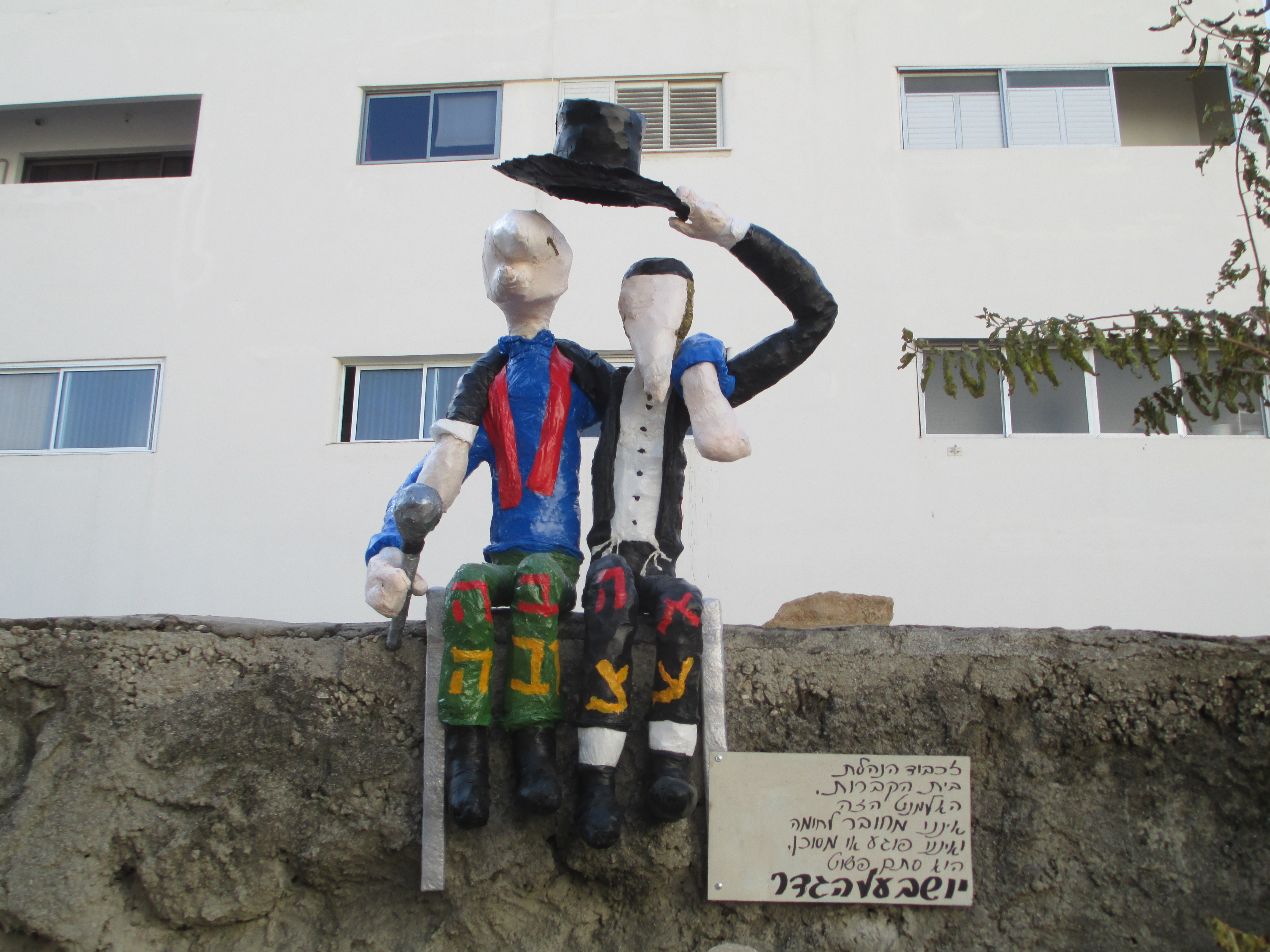 הפסל "יושב על הגדר" על חומת בית הקברות טרומפלדור מעל קברו של אריק איינשטיין